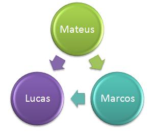 Hipotese Agostiniana